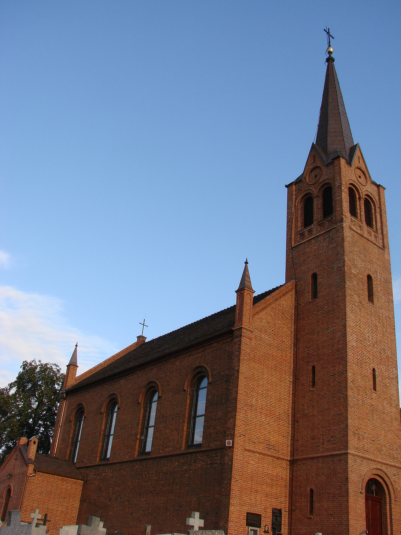 Kościół filialny pw. św. Jana z Dukli z 1861 r. w Dobiercicach, gmina Byczyna